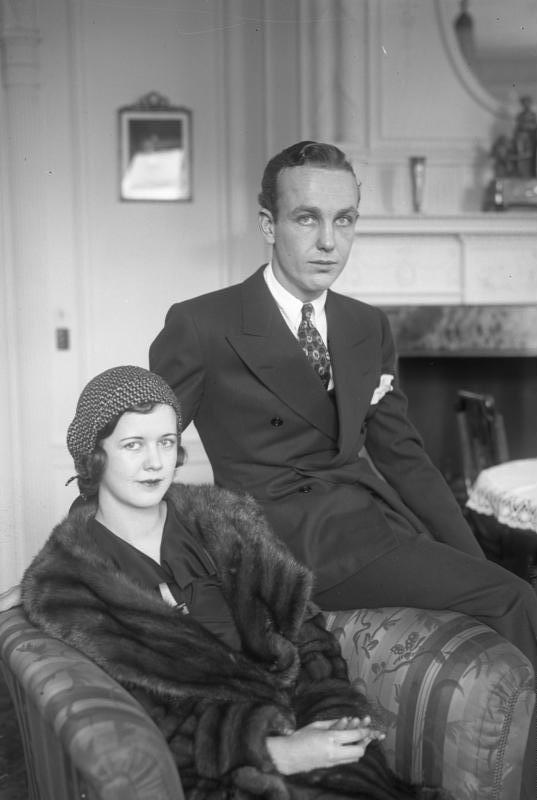 Der Sohn des amerikanischen Zeitungskönig in Berlin! Der Sohn des amerikanischen Zeitungskönigs William Randolf Hearst jr. ist mit seiner jungen Gattin in Berlin eingetroffen. Der Hearst-Konzern, den er von seinem Vater übernehmen wird, ist heute das grösste Zeitungsunternehmen der Welt.